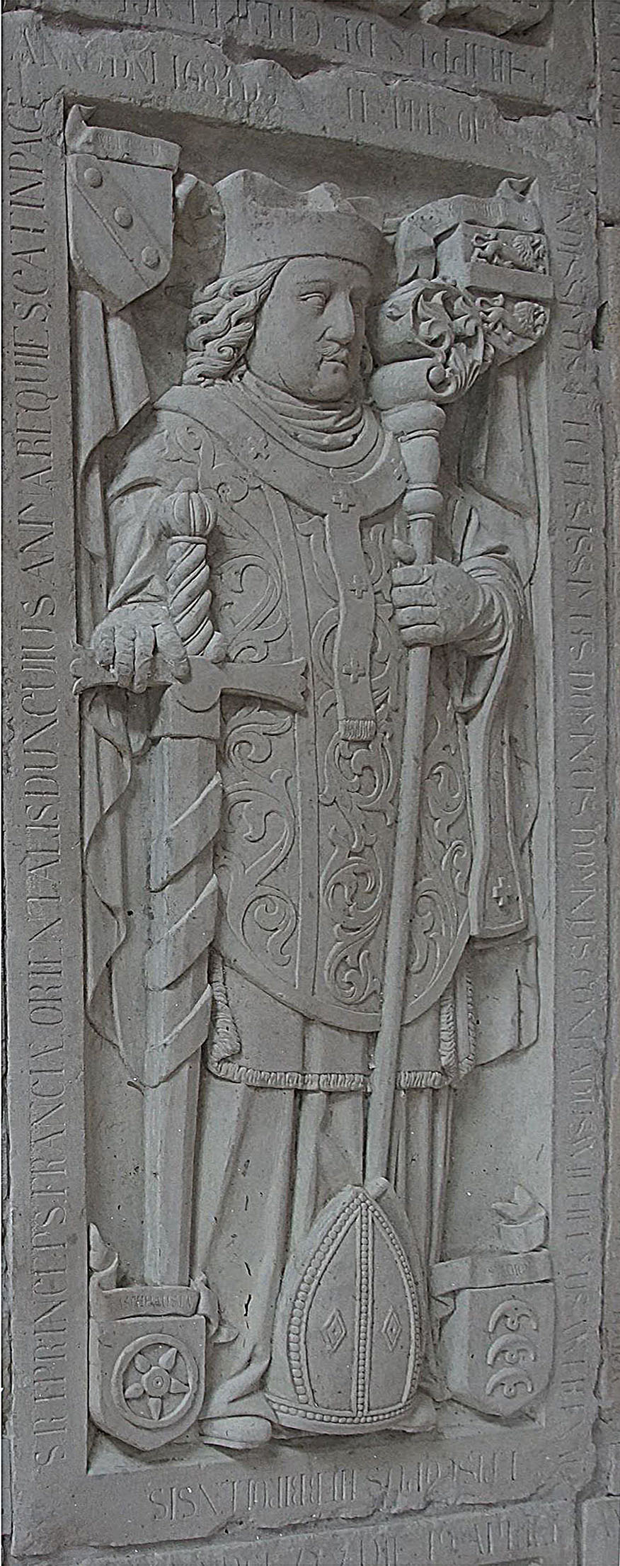 Grablege in der Marienkirche in der Festung Marienburg in Würzburg Konrad Wilhelm von Wernau (1683-1684) starb noch vor der päpstlichen Bestätigung